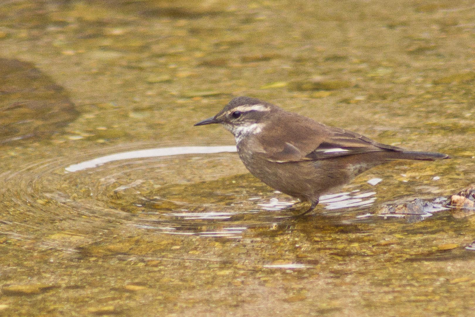 Remolinera chocolate